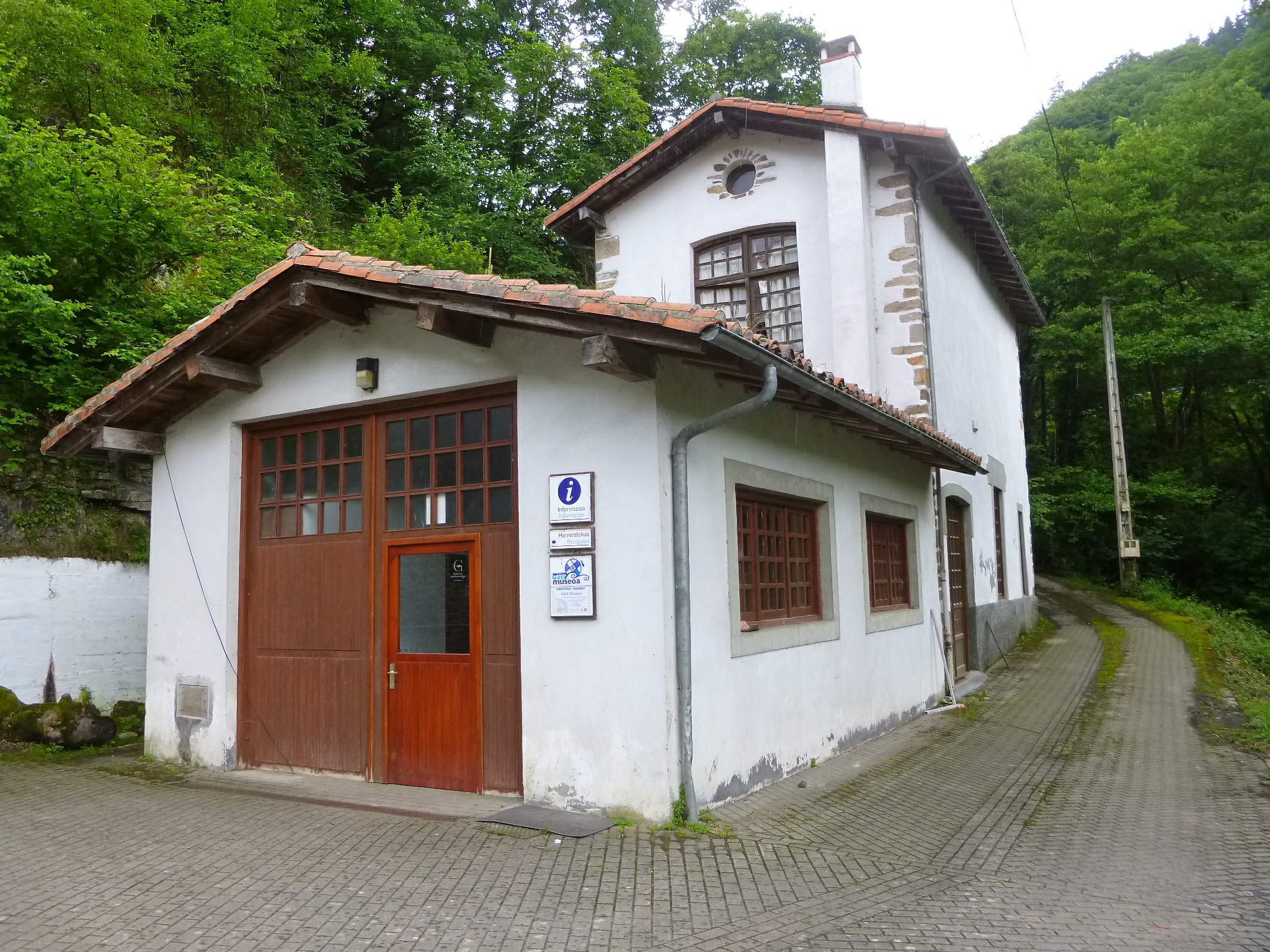 Museo de la sal, en Leintz-Gatzaga (Salinas de Léniz), Gipuzkoa